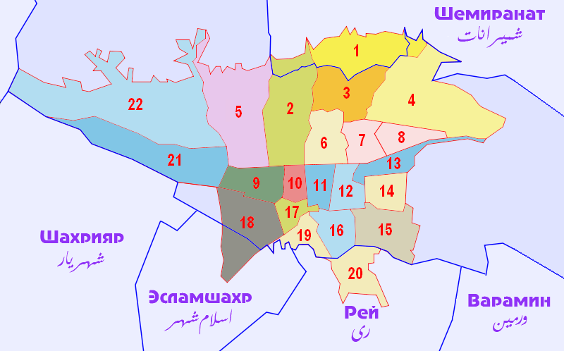 Карта муниципальных районов Тегерана